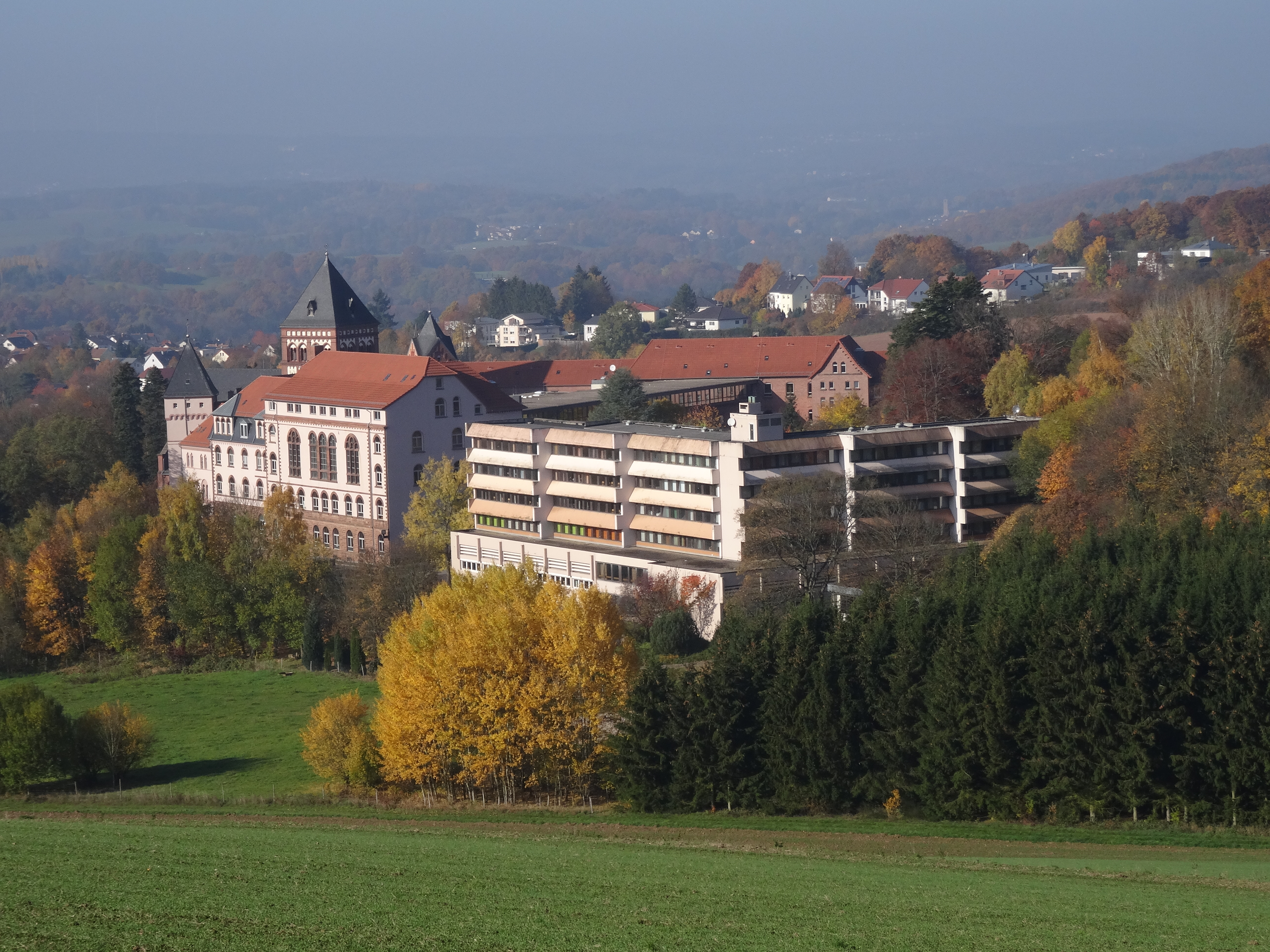 Gesamtkomplex des Arnold-Janssen-Gymmnasiums mit Internatsgebäude (im Volksmund: "Missionshaus") St. Wendel